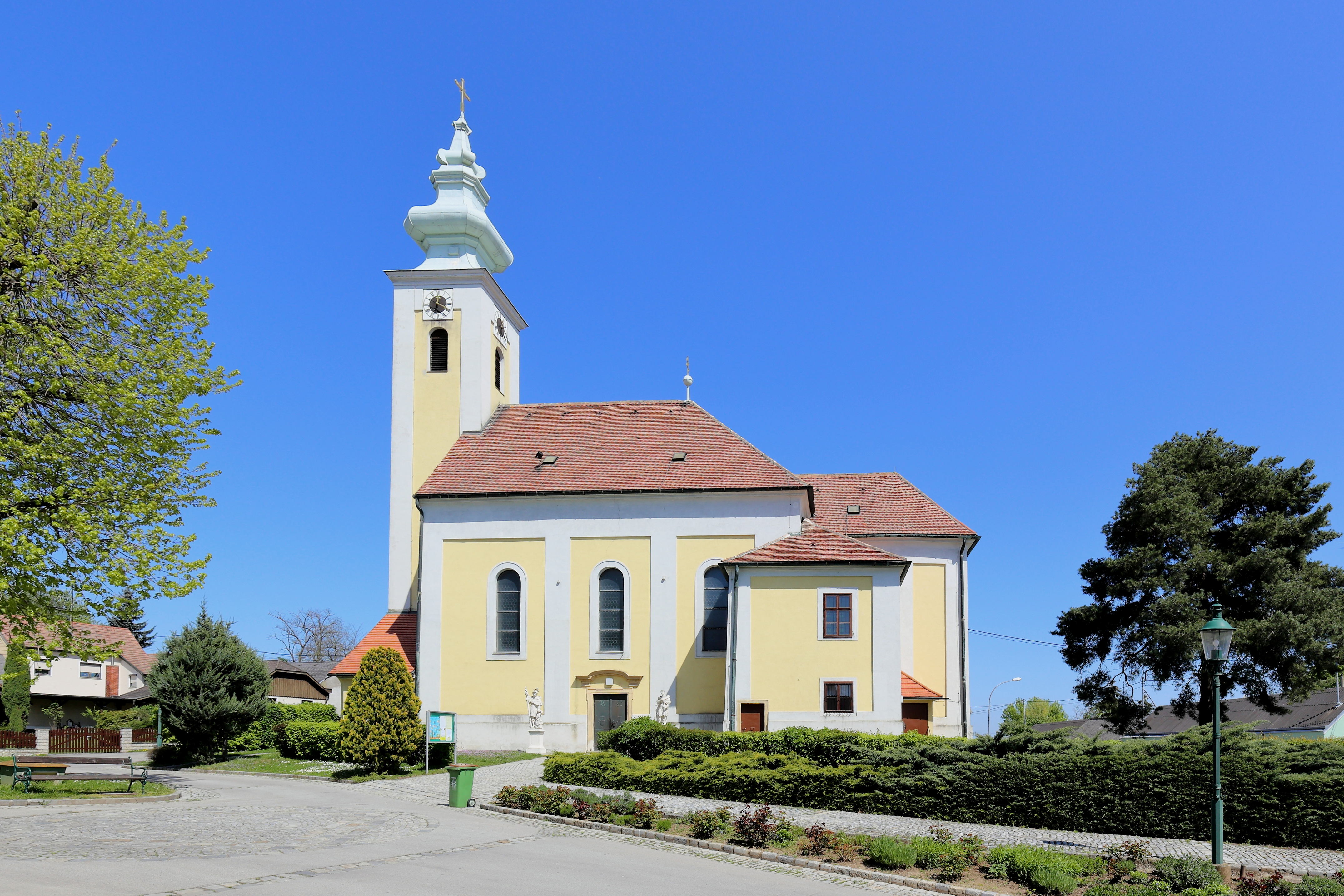 Südansicht der römisch-katholischen Pfarrkirche hl. Jakobus der Ältere in der niederösterreichischen Marktgemeinde Dürnkrut. Der einheitliche Barockbau mit vorgestelltem Westturm wurde unter Graf Jakob Hamilton 1698 errichtet.